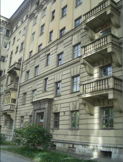 Тверская улица, Санкт-Петербург Фото Augusto Romero, 10 сентября 2005 года